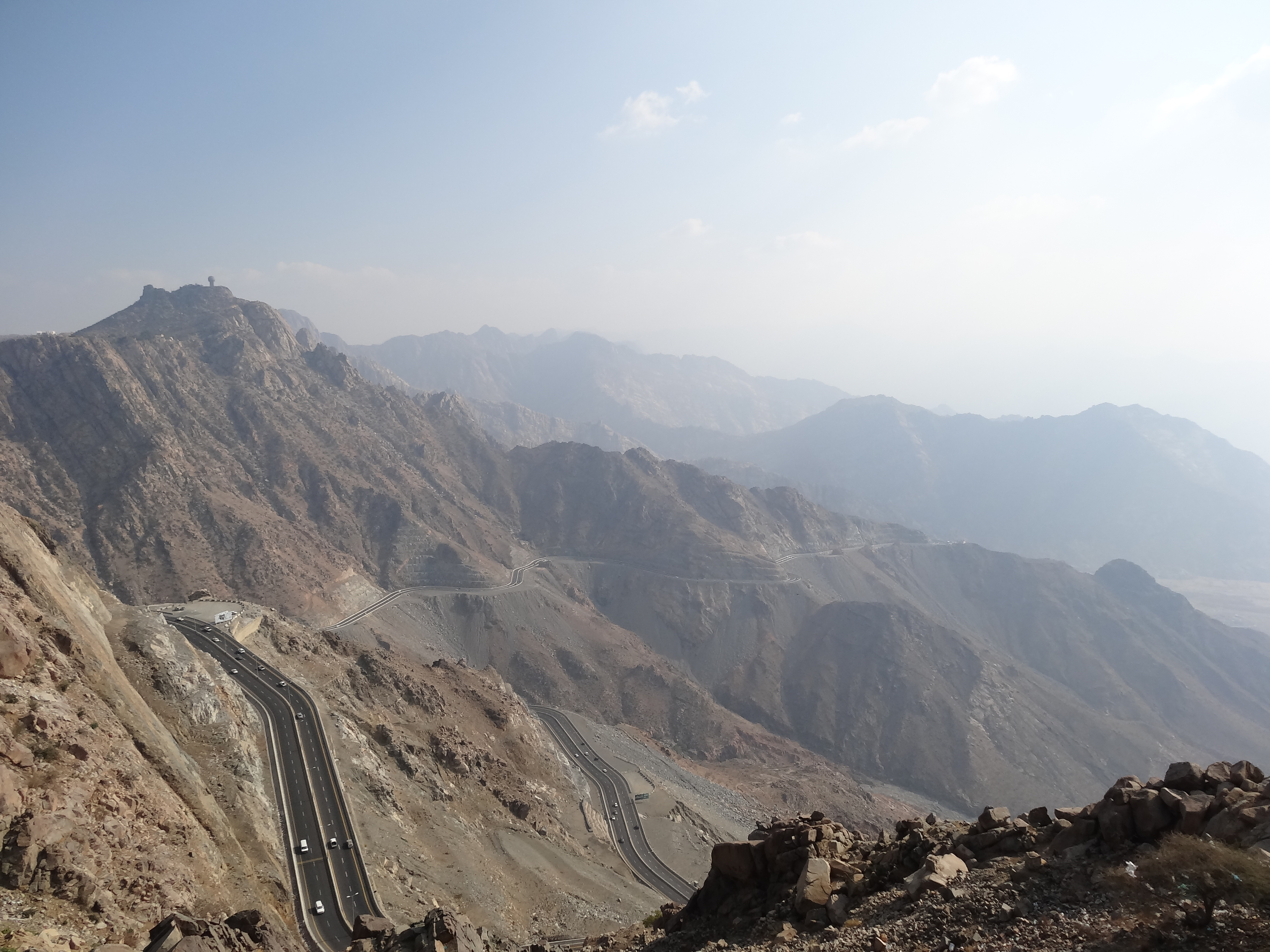 Saudi Mountain Road